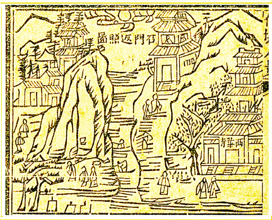 “石门返照”清代中后期木刻